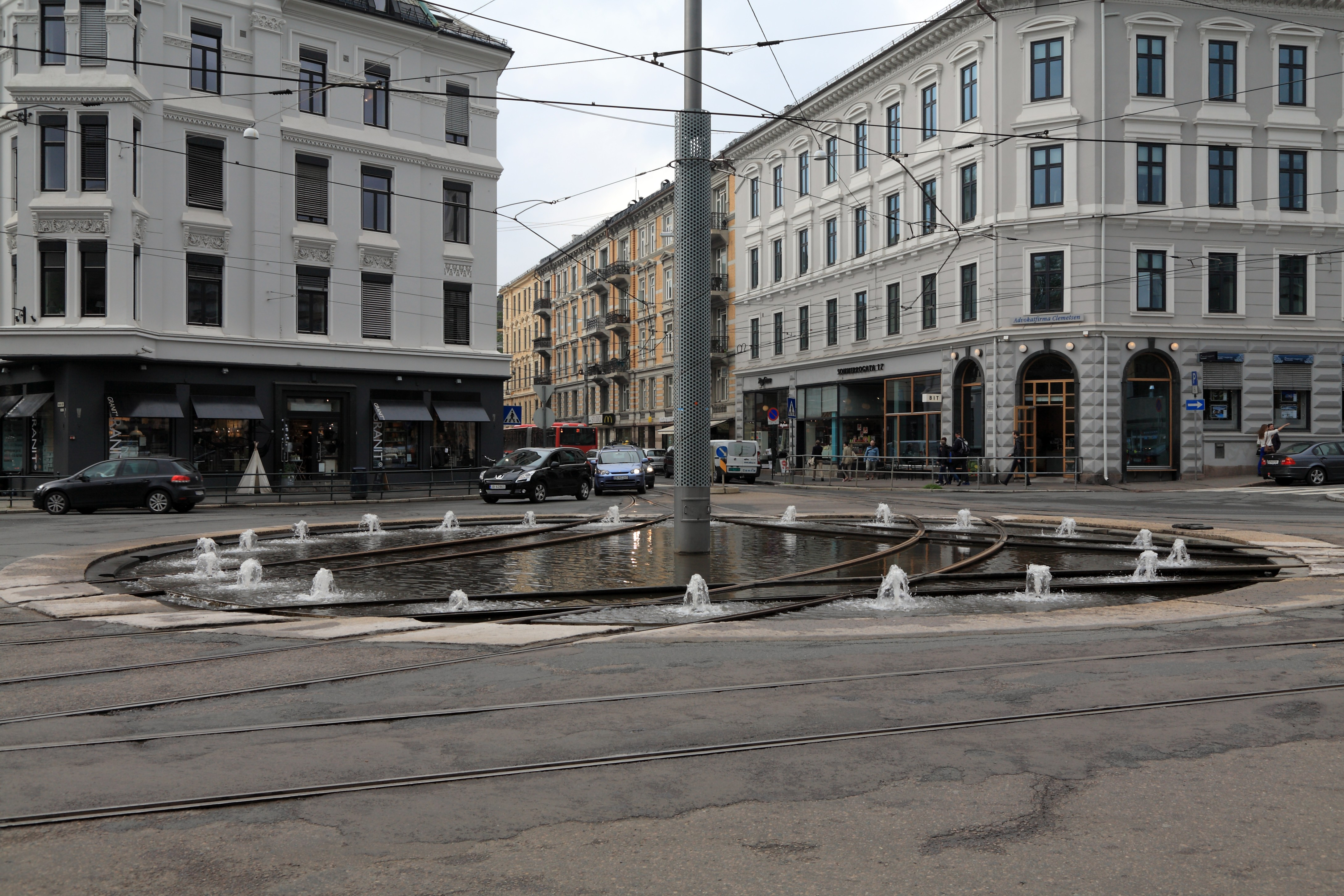 Die Straßenbahngleise führen durch das Brunnenbecken, die Fontänen werden vor jeder Fahrt durch das Becken runtergeregelt. Richtung Frognerveien